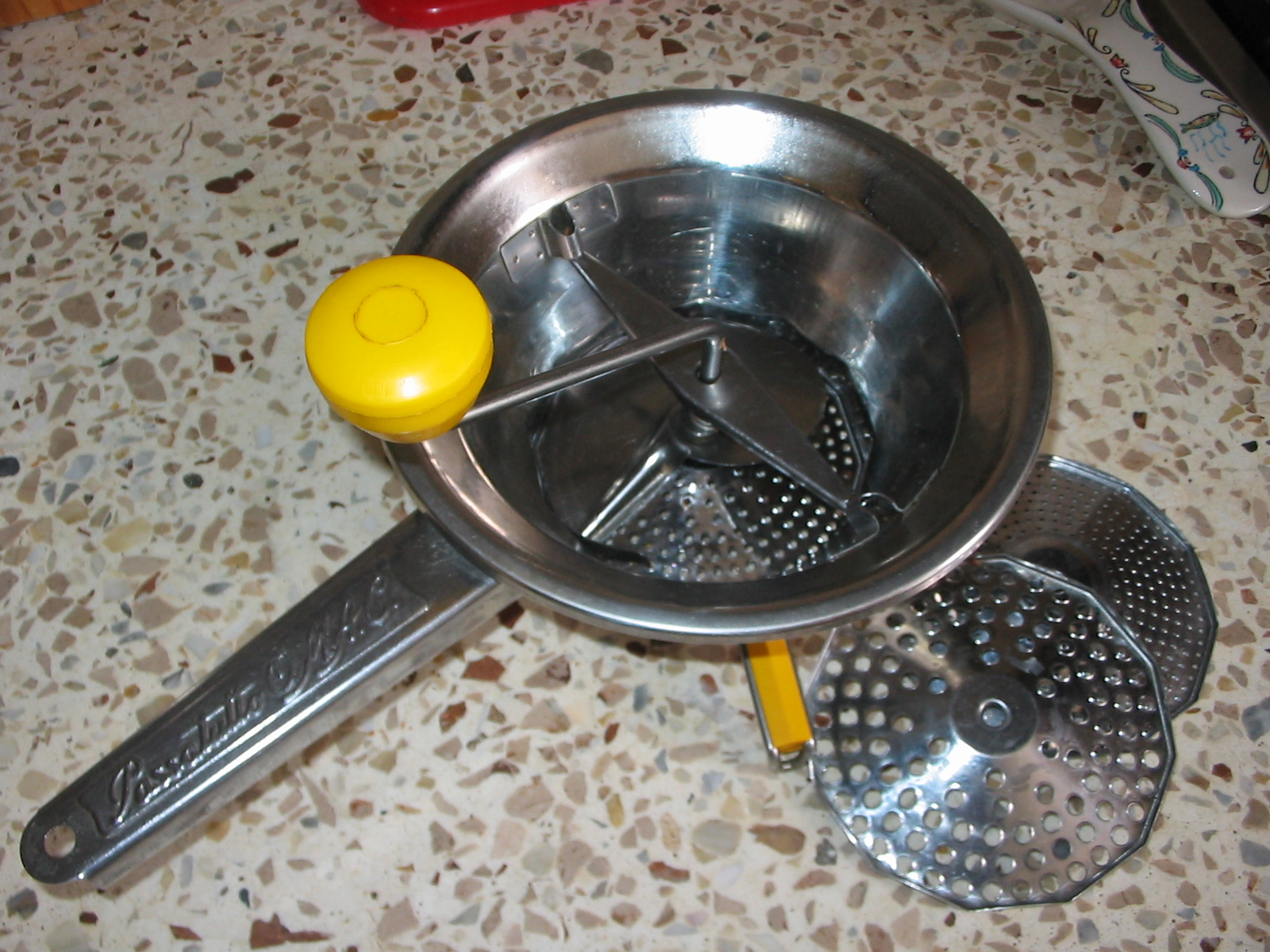 Терка механічна